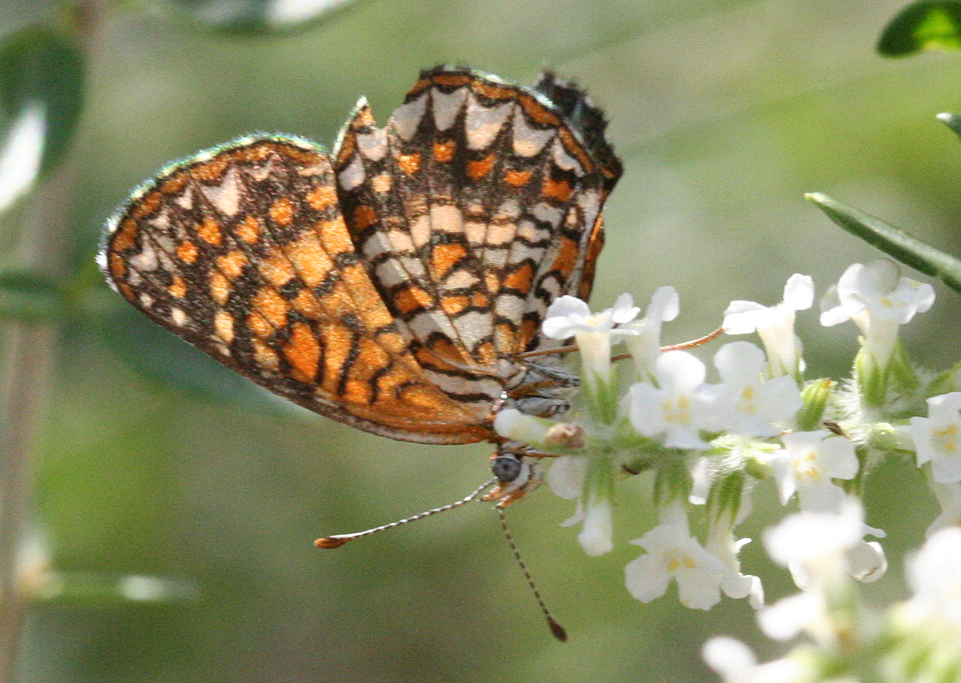 Elada checkerspot (Texola elada)